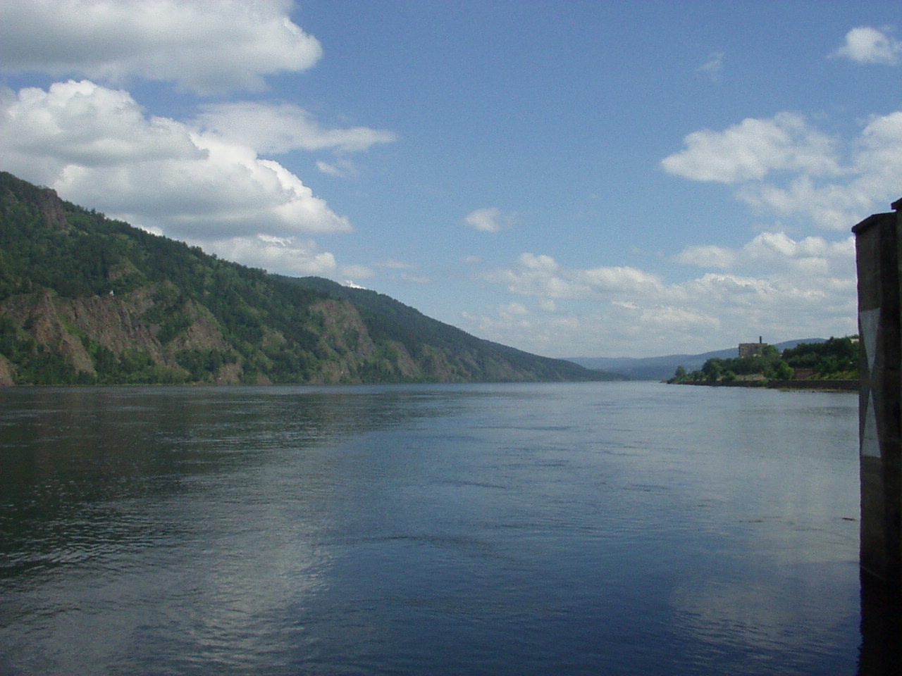 Yenisei river and banks seen from Divnogorsk town pier, Krasnoyarski krai